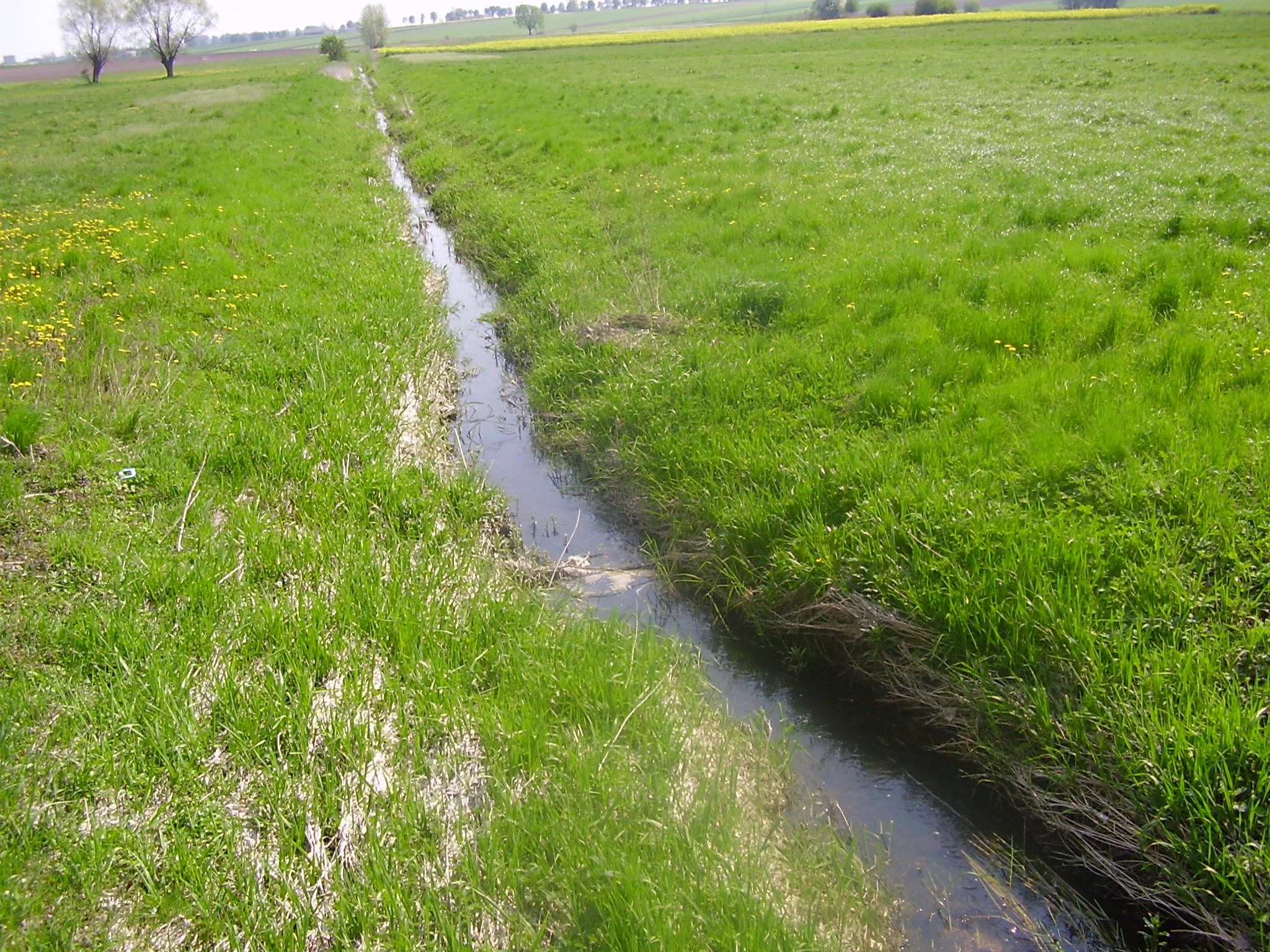 Rzeka Słudwia widziana z mostu